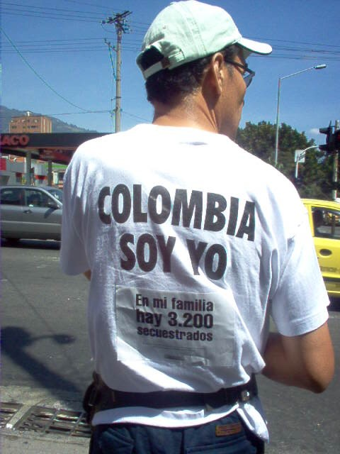 Foto: Rommel Cabrera Sosa / especial para equinoXio